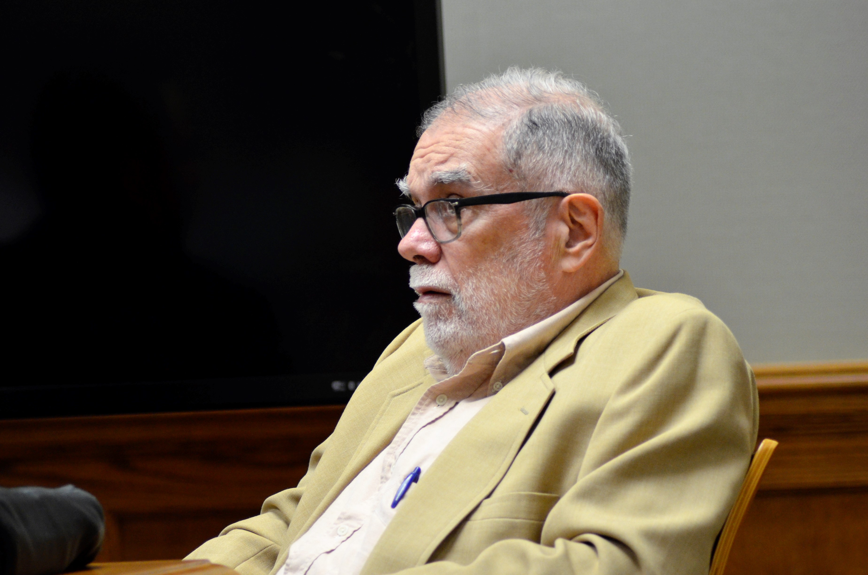 Enrique Fierro en una conferencia sobre poesía hispanoamericana en el campus de Texas A&M University (22 de abril de 2015)